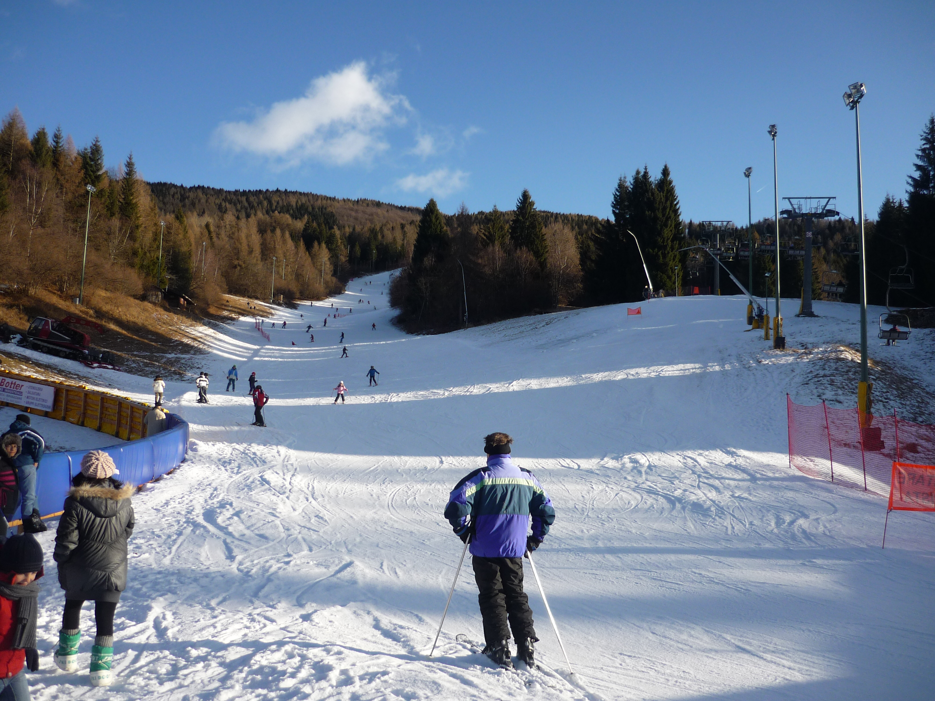 Vista della pista in Piazzale Nevegal